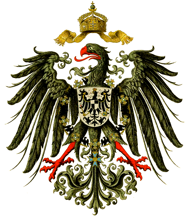 Kleines Deutsches Reichswappen nach 1888. Reichsadler mit Brustschild und Ordenskette.